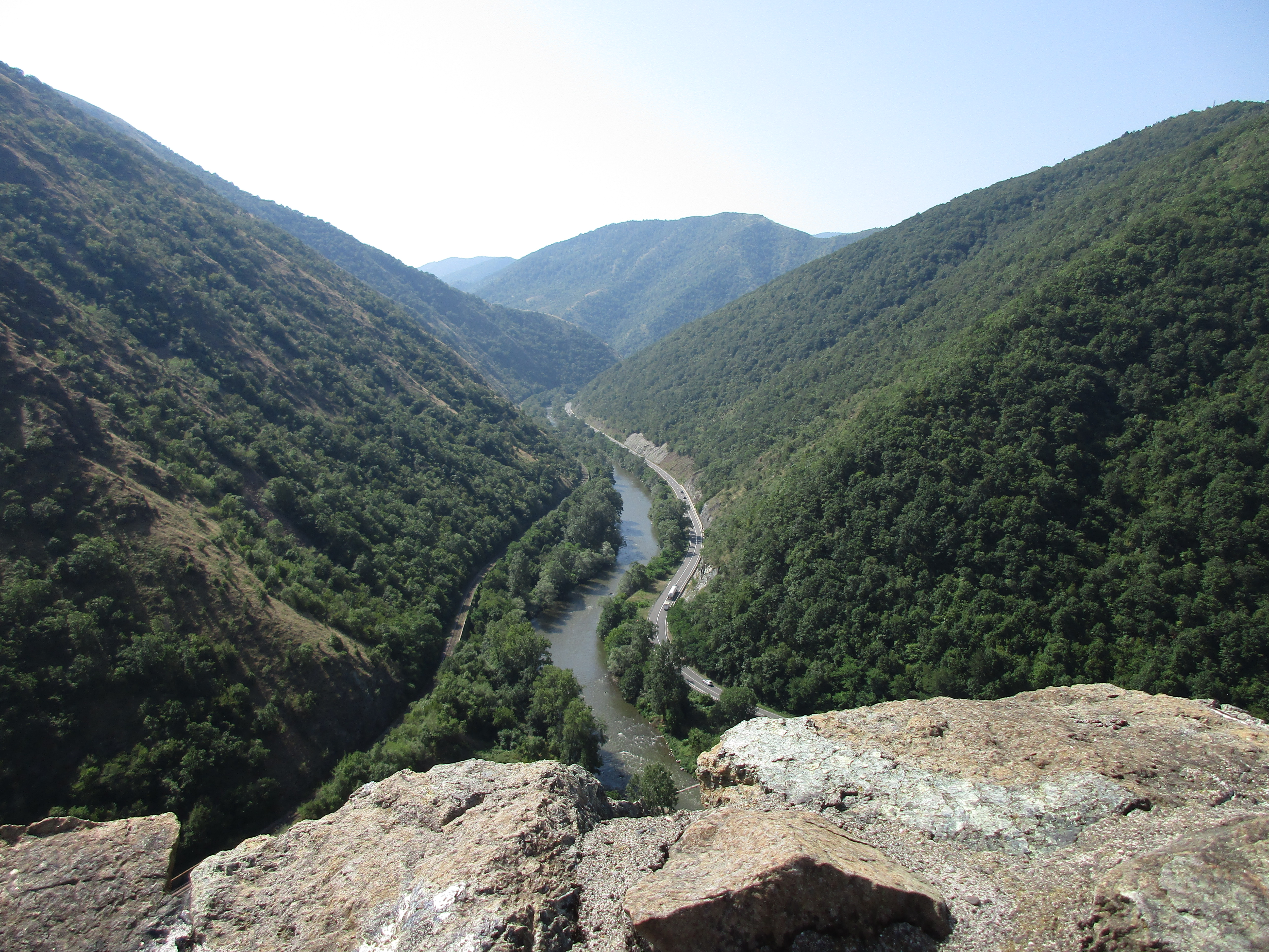 Srpski (latinica): Ibar, Kraljevo